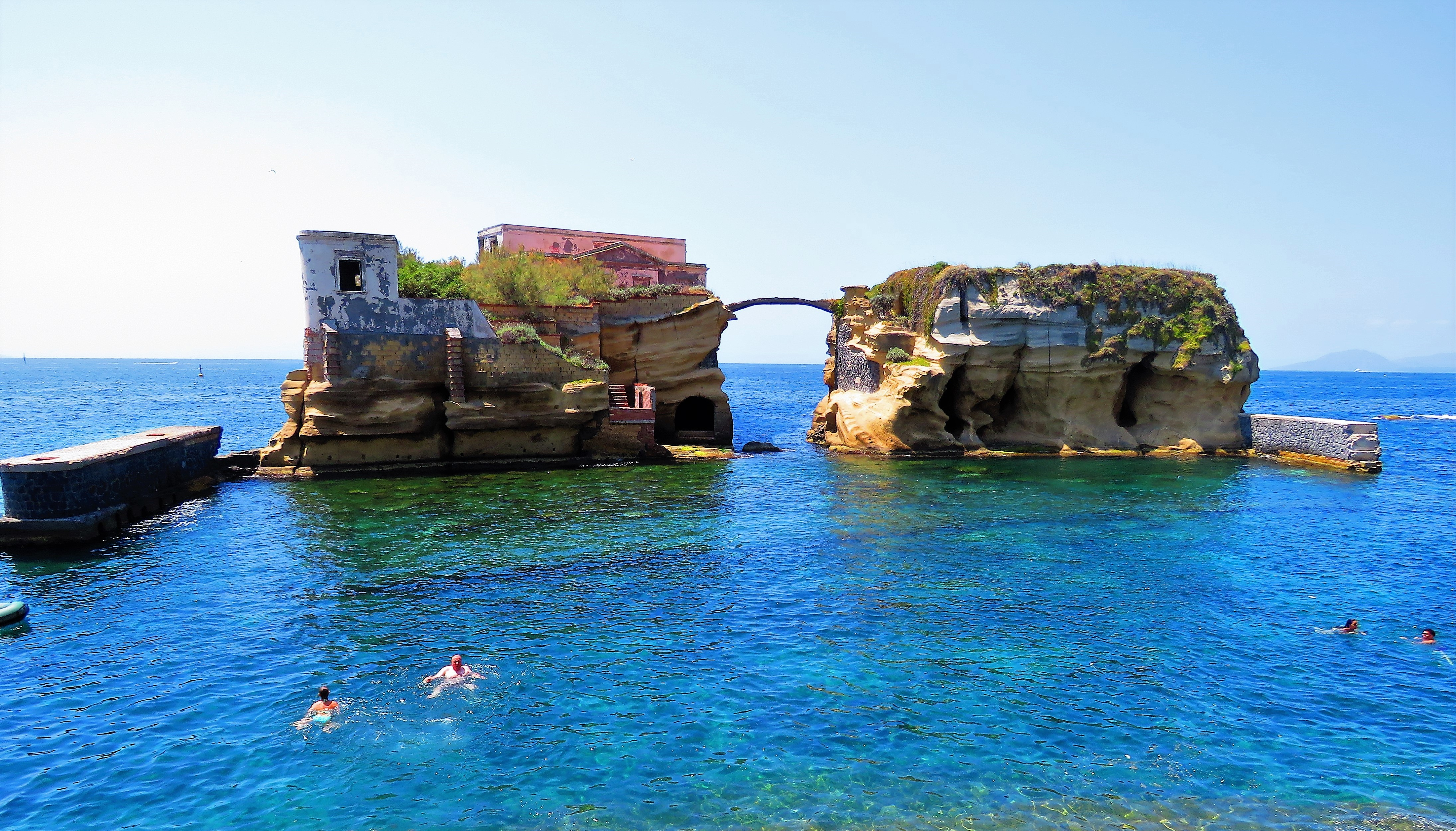 La Gaiola, Napoli.